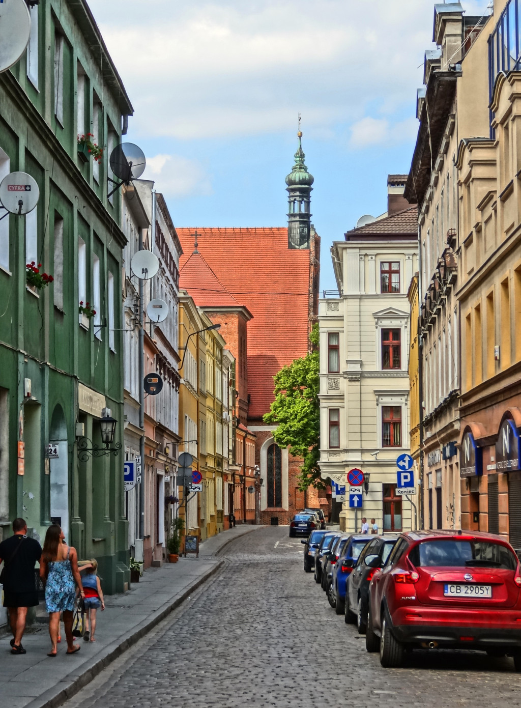 Ulica Jezuicka w Bydgoszczy - widok na północ w kierunku katedry